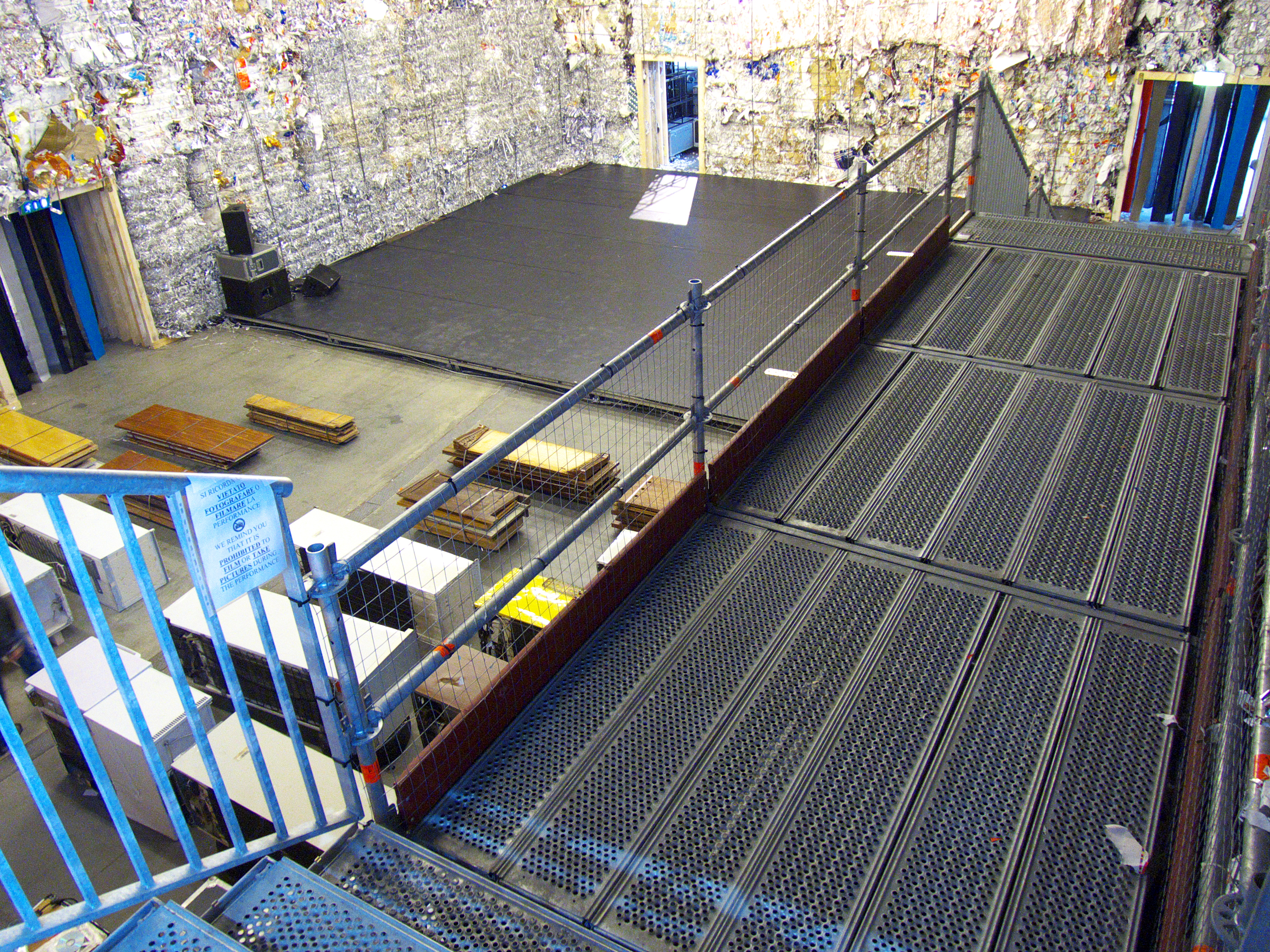 Casa delle contaminazioni, Artissima 17